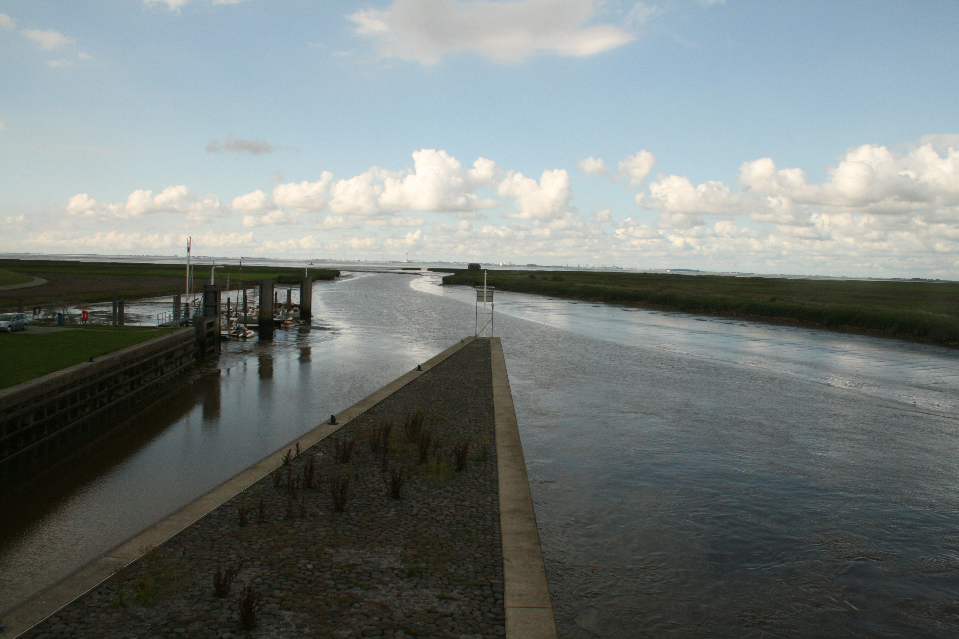 Nieuwe Statenzijl 10 Dollardzijden met kleine jachthaven (2010)